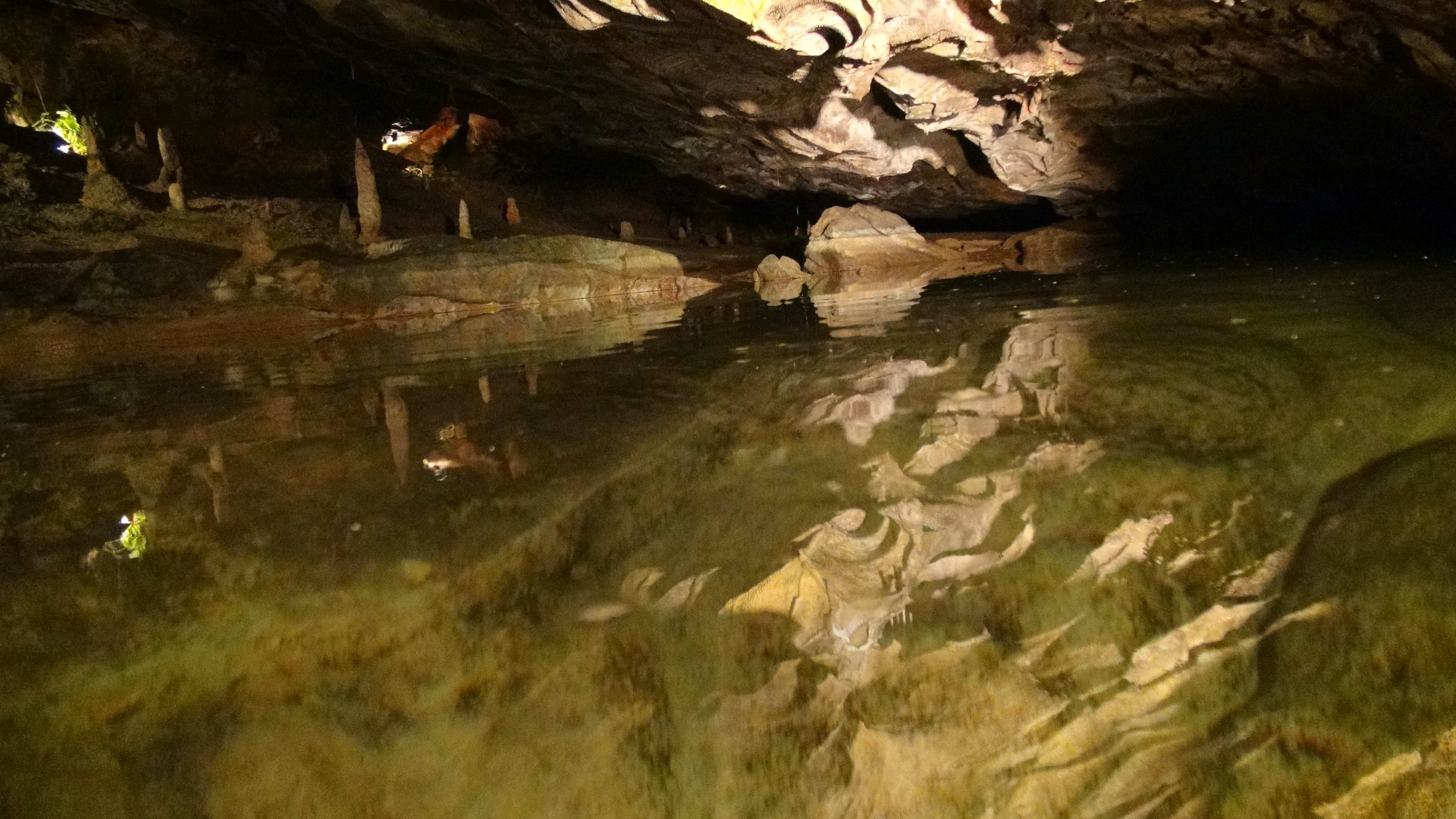 Beatushöhlen